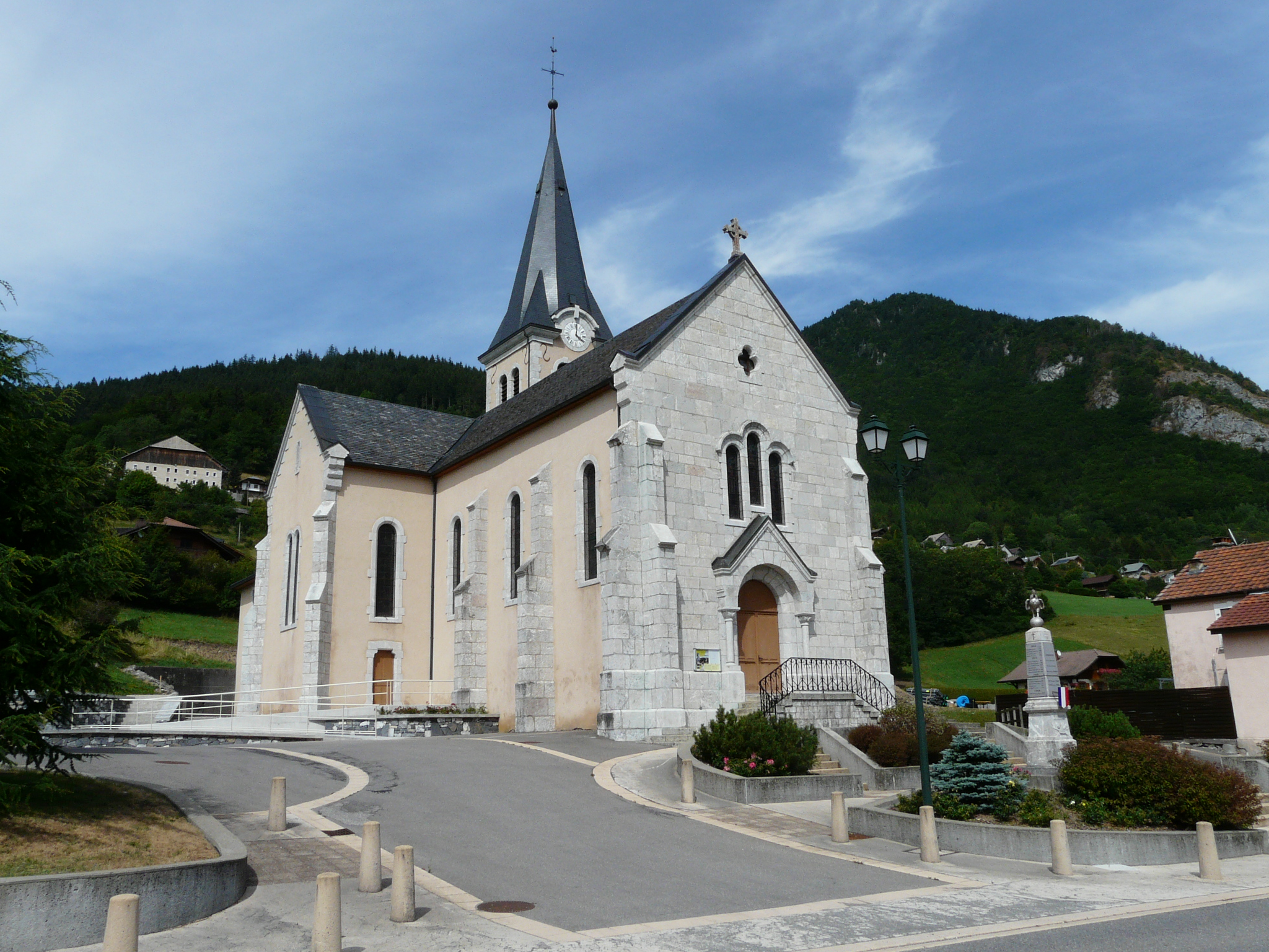 Chevenoz (Haute-Savoie, France) : l'église et le monument aux morts